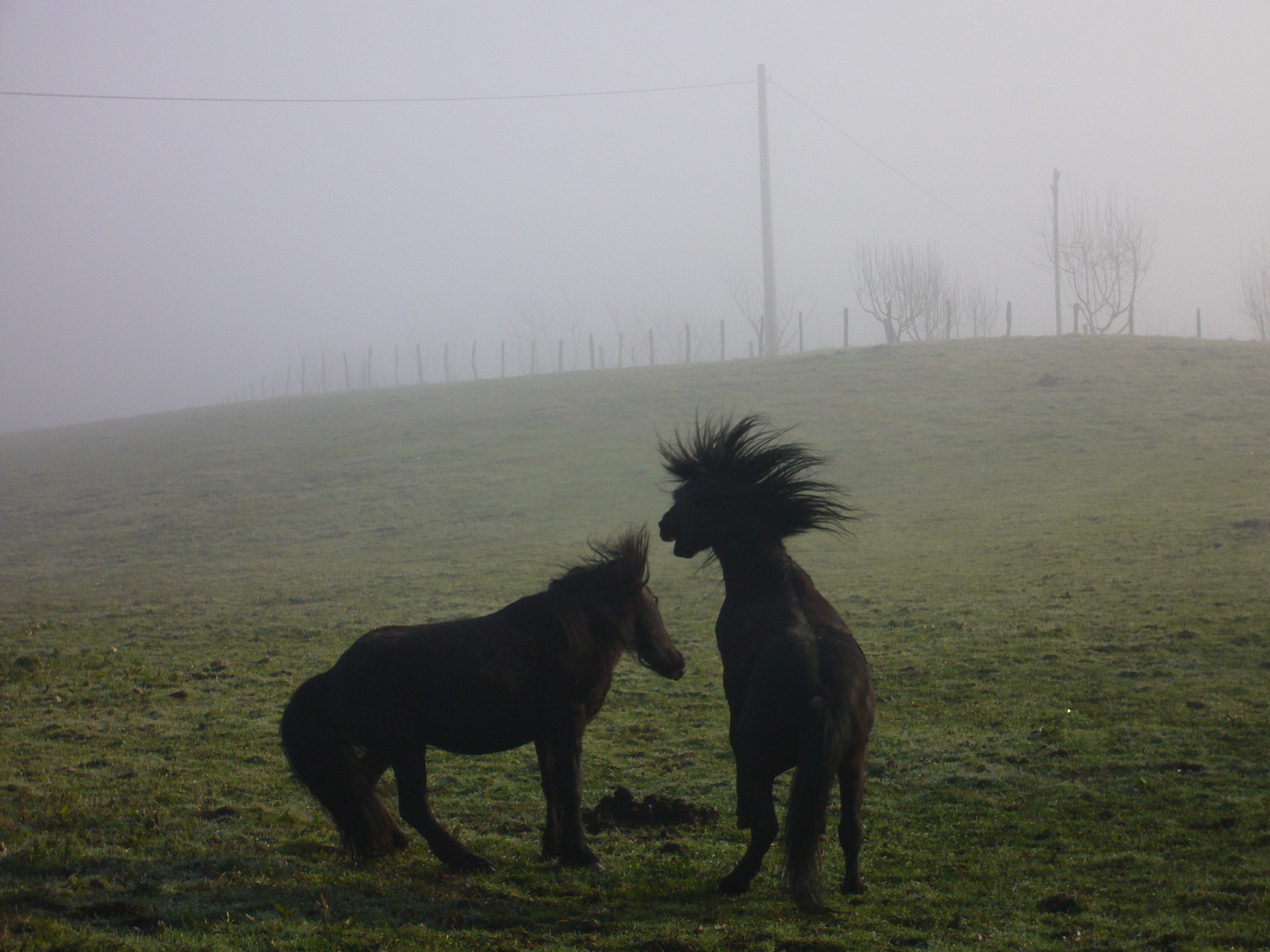 Bi pottoka zaldi borrokan, Pagoetako Natura Parkean